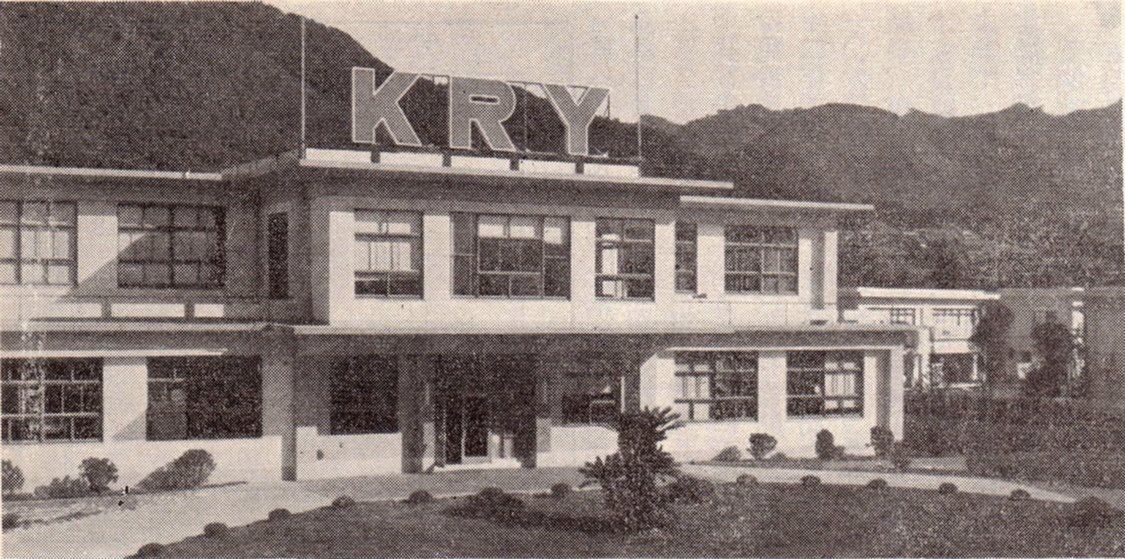 KRY山口放送・テレビ開局当初の本社屋（山口県徳山市公園区、現在は周南市） 1959年から1961年の間に撮影。